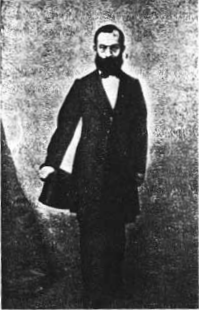 Oscar Berger-Levrault (1826-1903), of Strasbourg